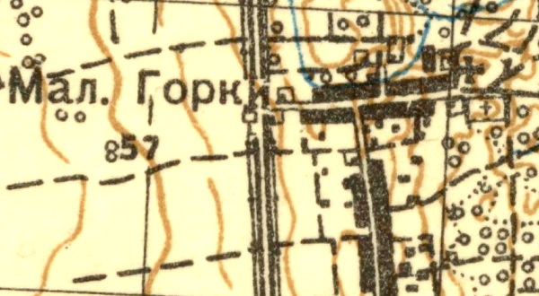 Топографическая карта Ленинградской области, квадрат О-35-12-Г (Ропша), деревня Малые Горки